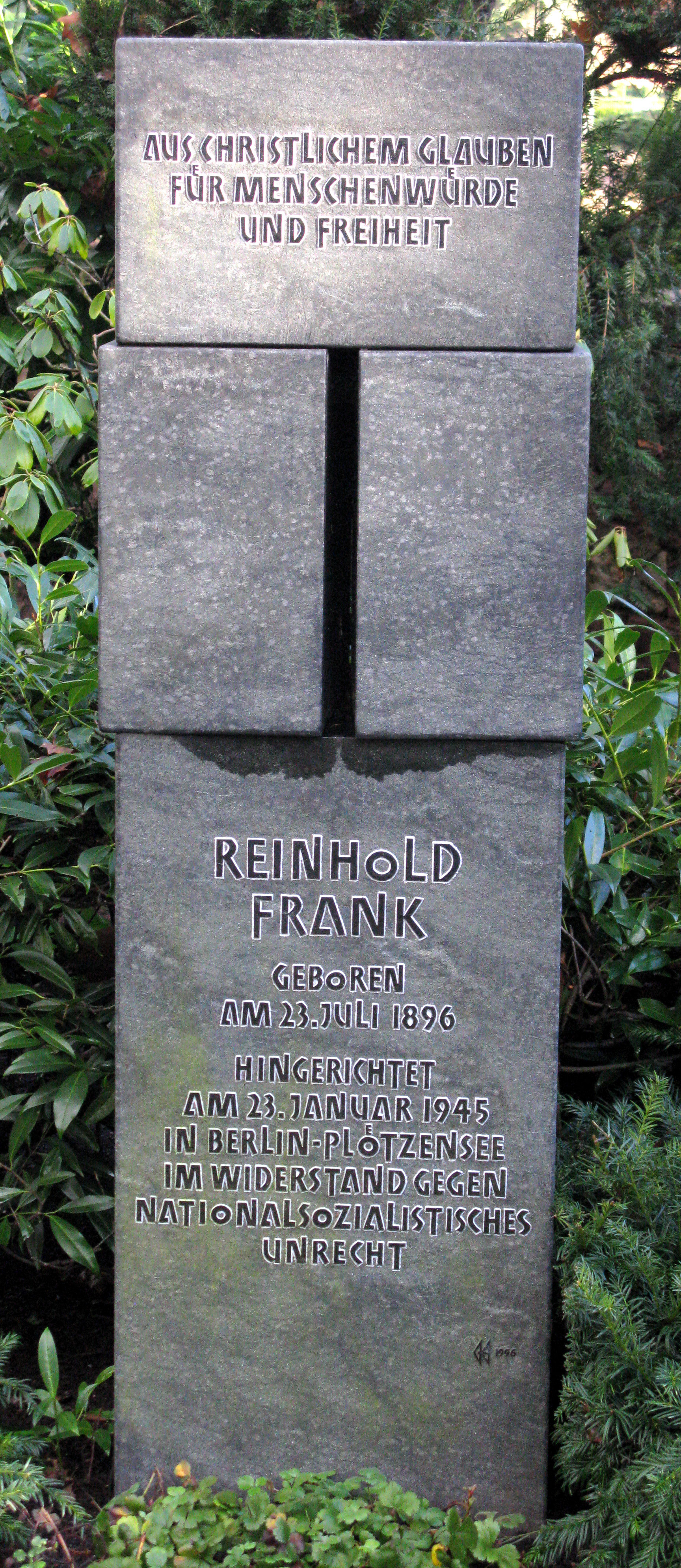 Hauptfriedhof Karlsruhe, Gedenkstein für den ermordeten Widerstandskämpfer Reinhold Frank